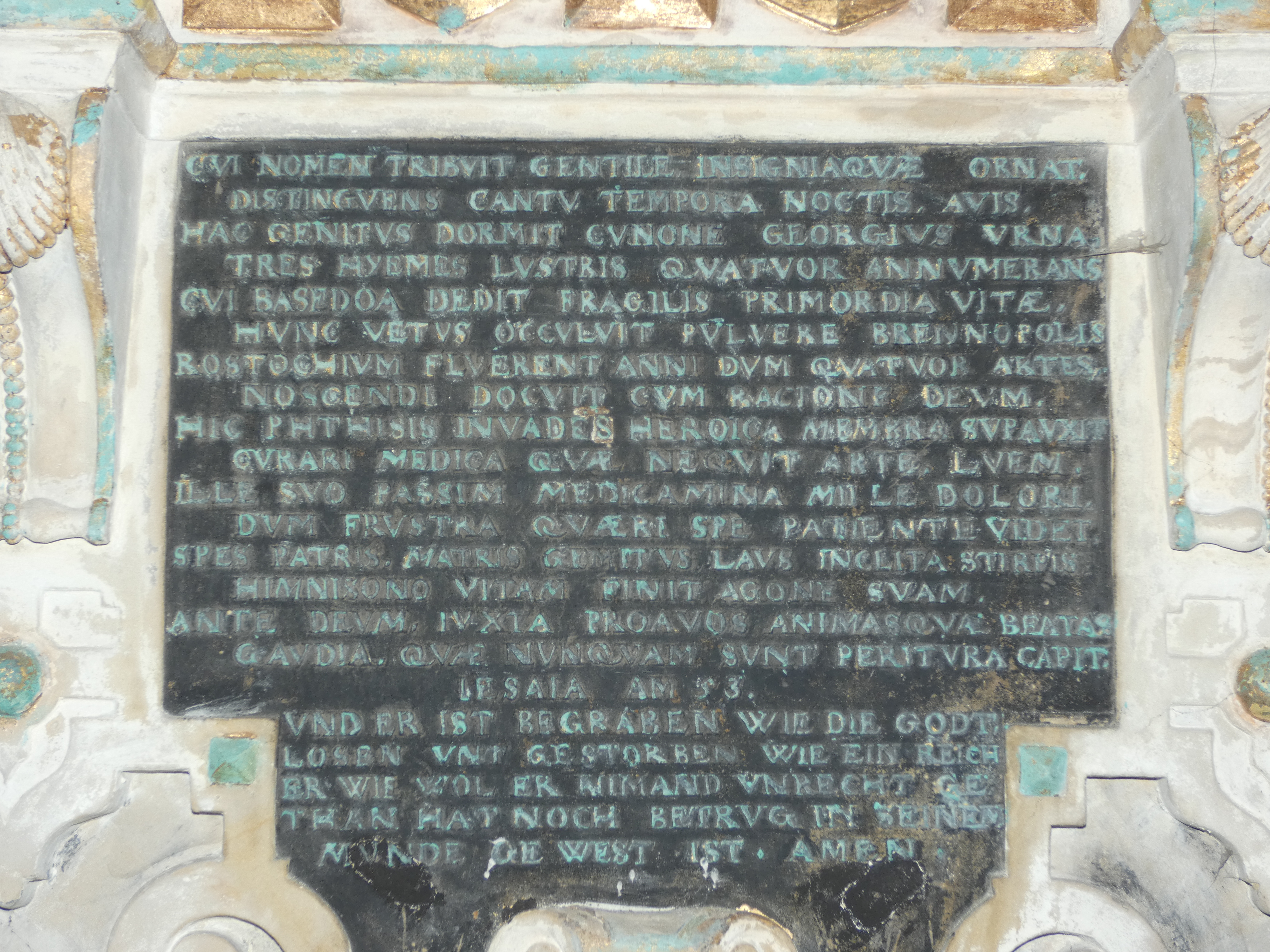 Epitaph Georg Cuno Hahn von Basedow Details